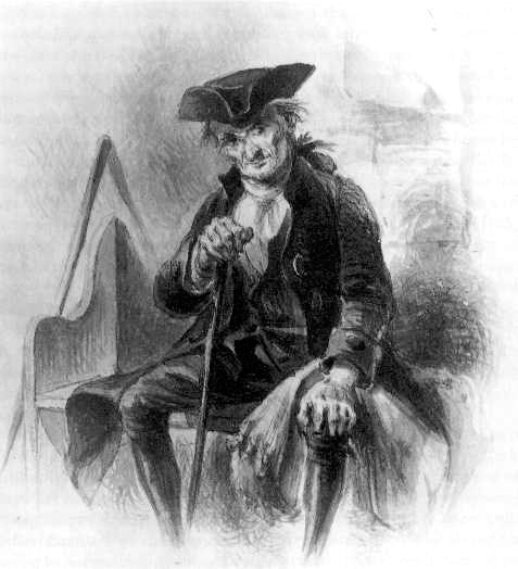 Diedrich Knickerbocker; wash drawing.